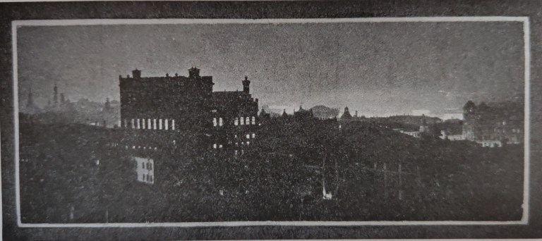 Фотографування уночі. : Альфред Стігліц